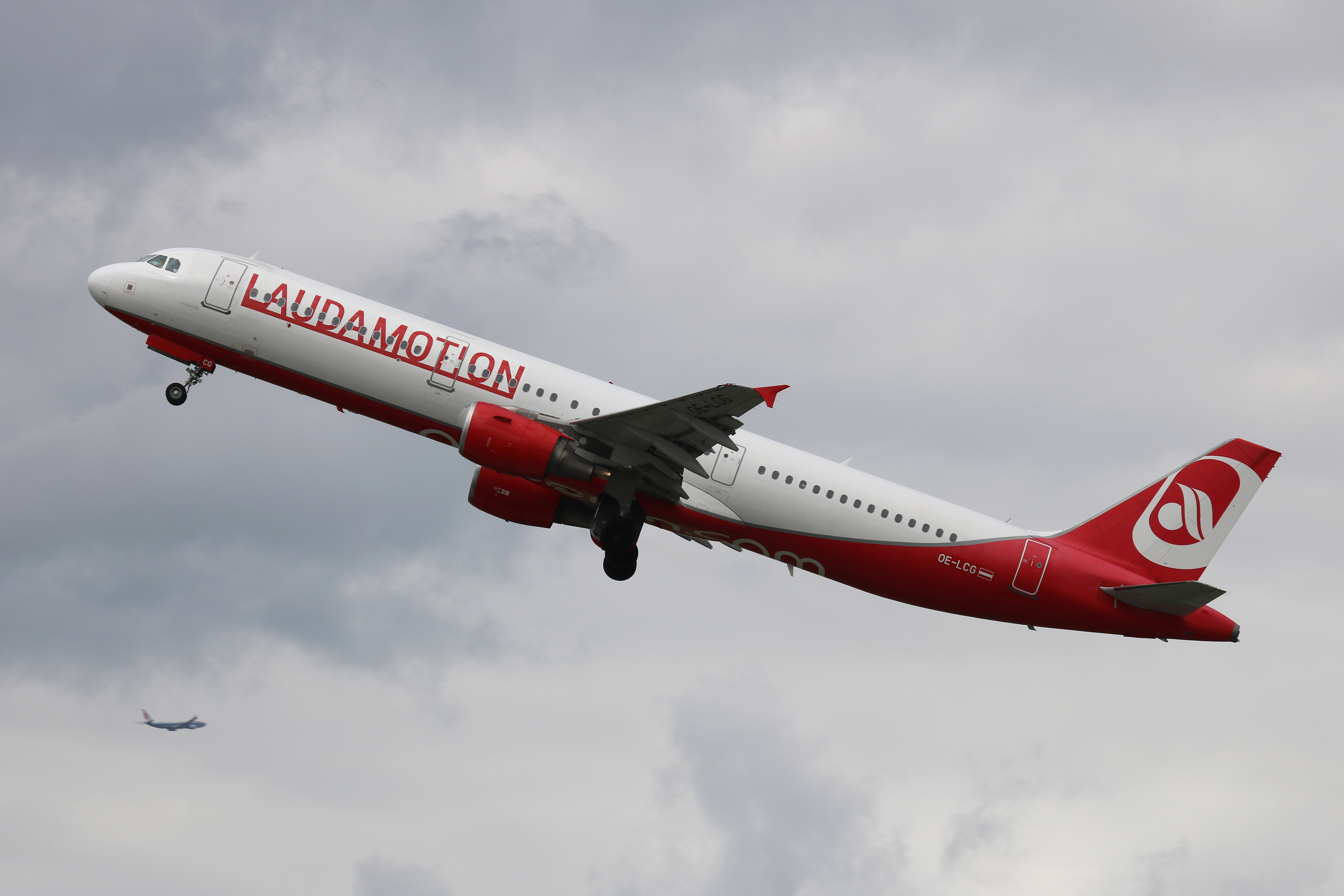 Flughafen Düsseldorf, Airbus A321-200 (OE-LCG) der Laudamotion